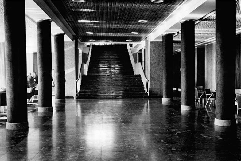 Berlin, Nalepastraße, Sendeanstalt,, Foyer Zentralbild Sturm Wjt-Th 9.2.56 Neues Funkhaus fertiggestellt Der am 16. Februar 1955 durch Brandstiftung zerstörte große Sendesaal des Staatlichen Rundfunkkomitees Berlin, Nalepastrasse, ist nach modernsten Gesichtspunkten wiederaufgebaut worden. Dirigenten und Musiker, Sänger, Regisseure und Schauspieler finden in den neuen Räumen großartige Bedingungen für ihre künstlerische Arbeit beim Rundfunk. Nach knapp einjähriger Wiederaufbauzeit wird zum erstenmal das Lichtsignal "Achtung: Sendung" aufleuchten. UBz: Blick in das Foyer des neuen Gebäudekomplexes. Schwarze, rot und gold abgesetzte Säulen führen den Besucher auf eine Treppe hin, die sich von unten nach oben verjüngt. Der Boden ist in polierten Marmor mit Einlegearbeiten gehalten, die Decke schalldämpfend verkleidet.